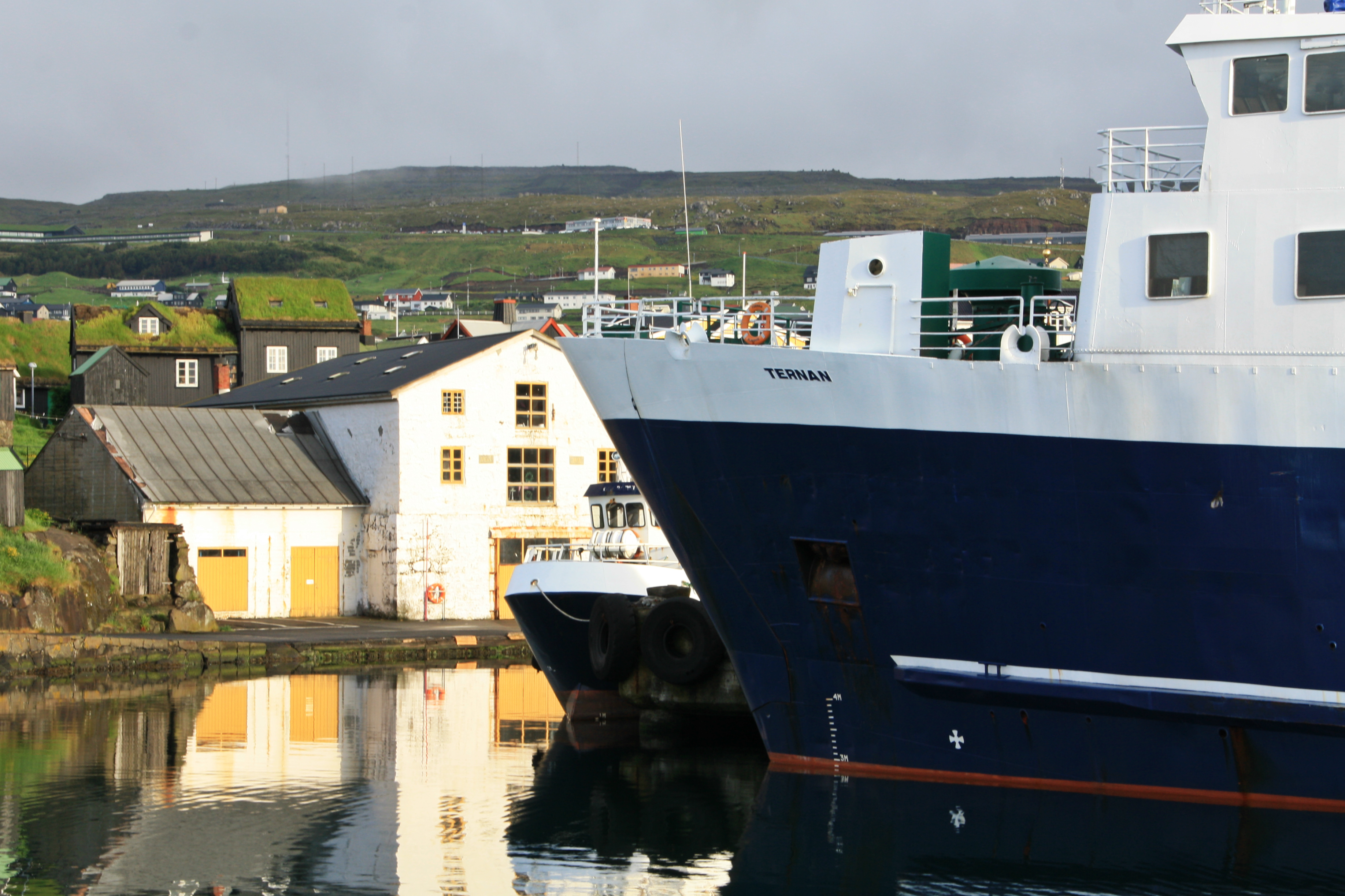 Tórshavn Harbour